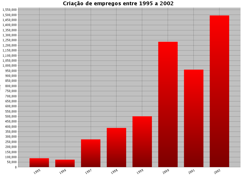 Criação de empregos no governo Fernando Henrique Cardoso (1995-2002).